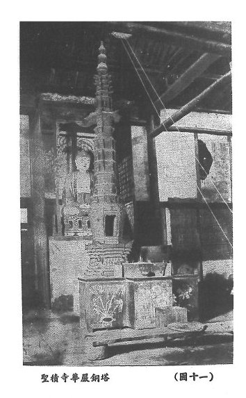 峨眉山老照片